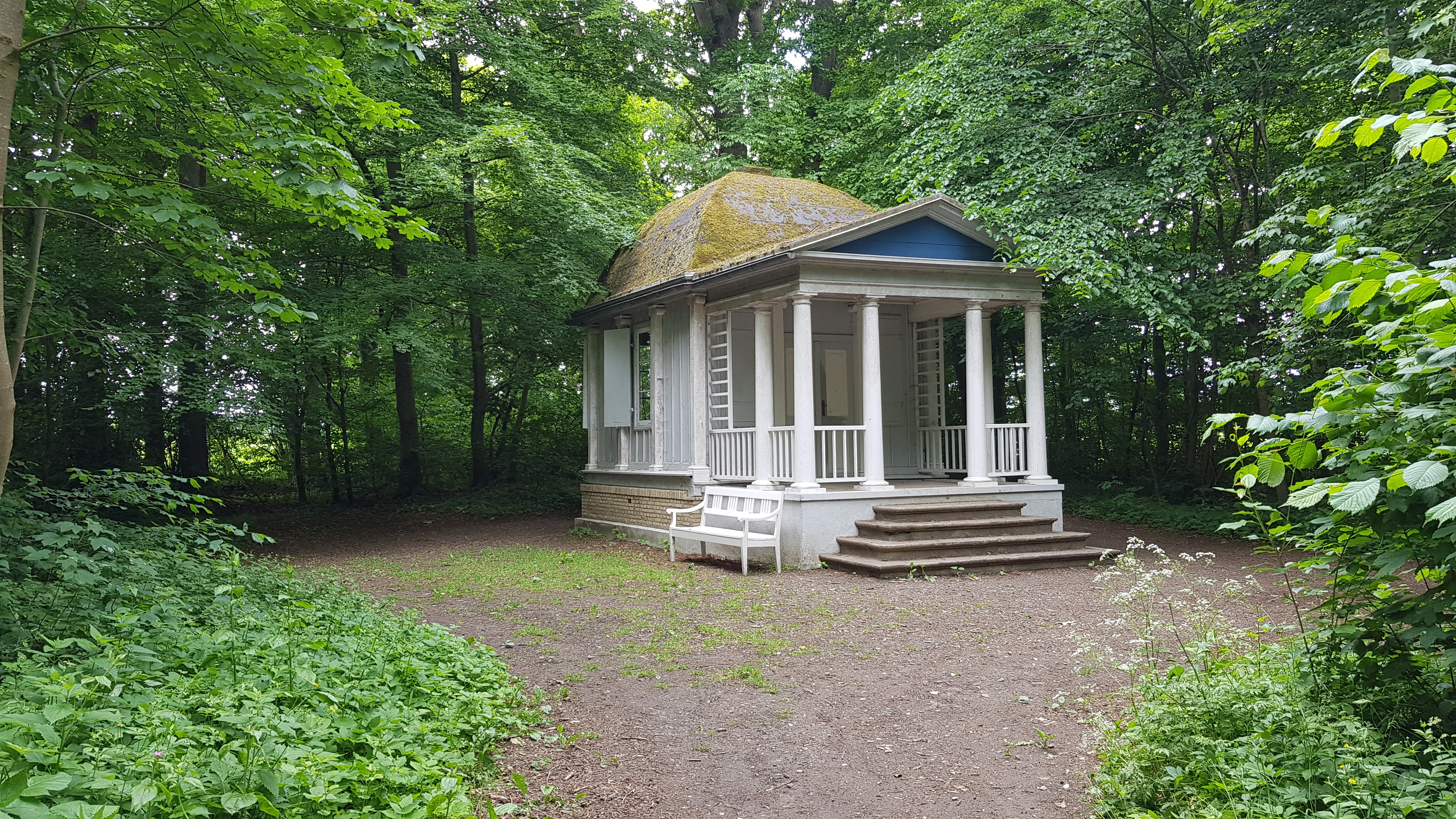 Pavillonen "Mine tanker" i Christinero